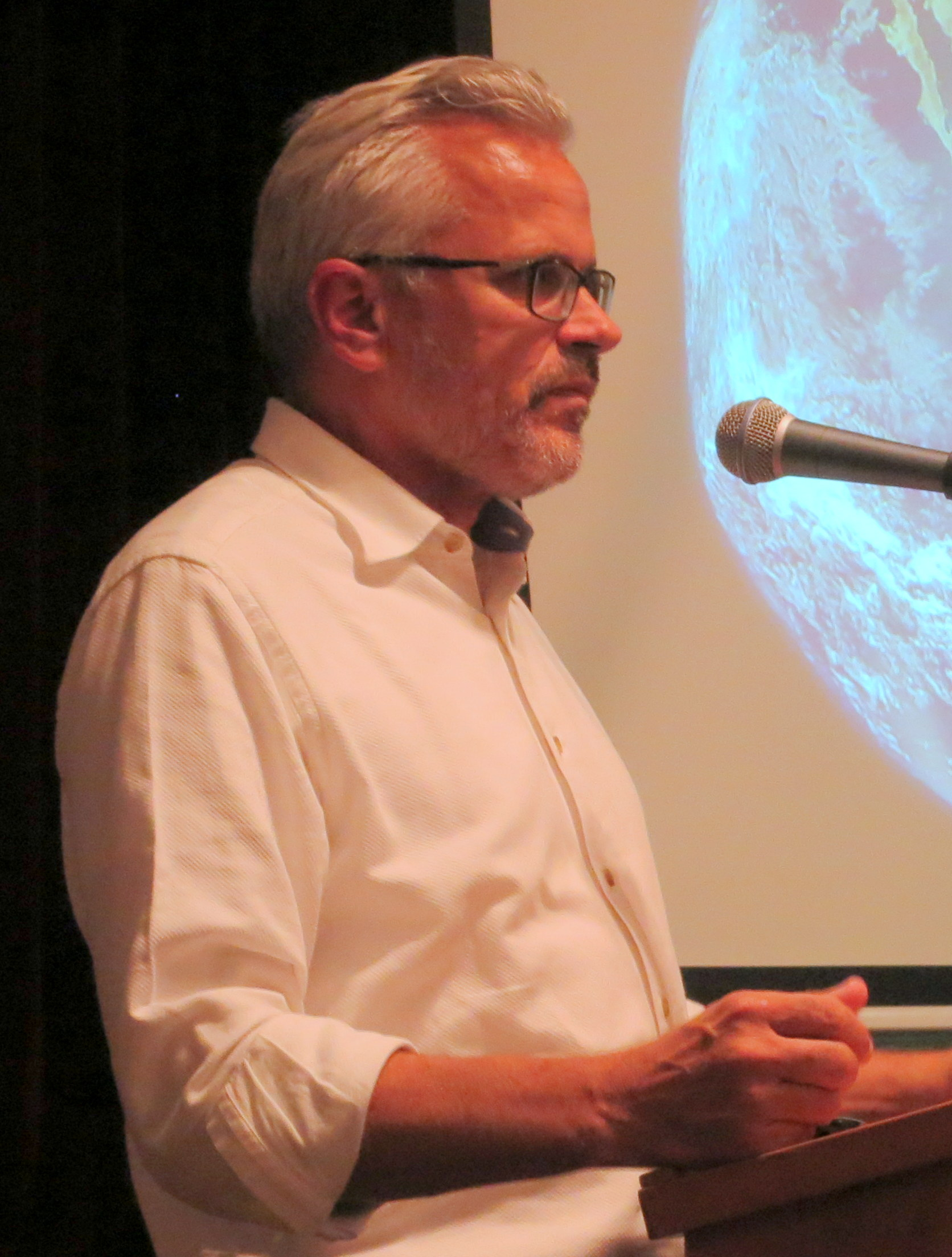 Eric Veuillet, Präsident der HSWT, 2018